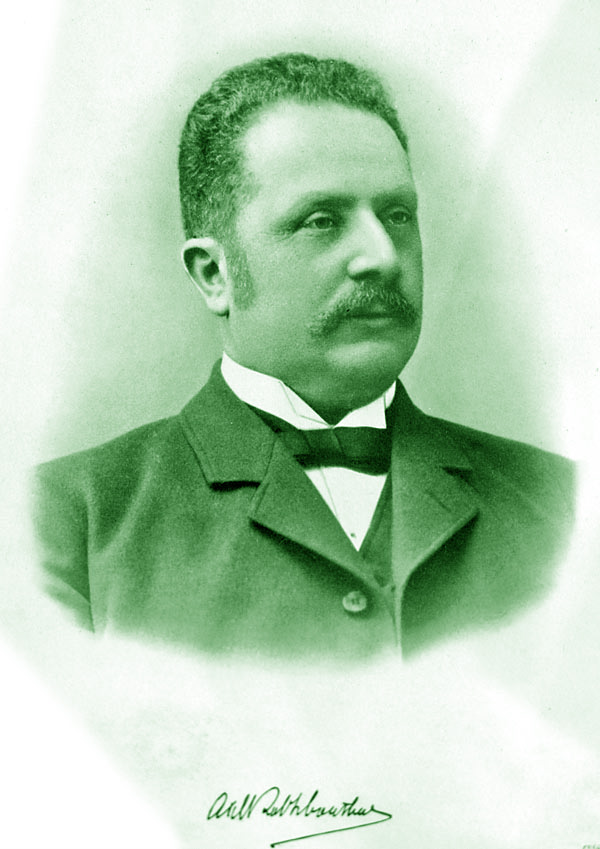 Schönthal, ordförande för roddsektionen till 1918.